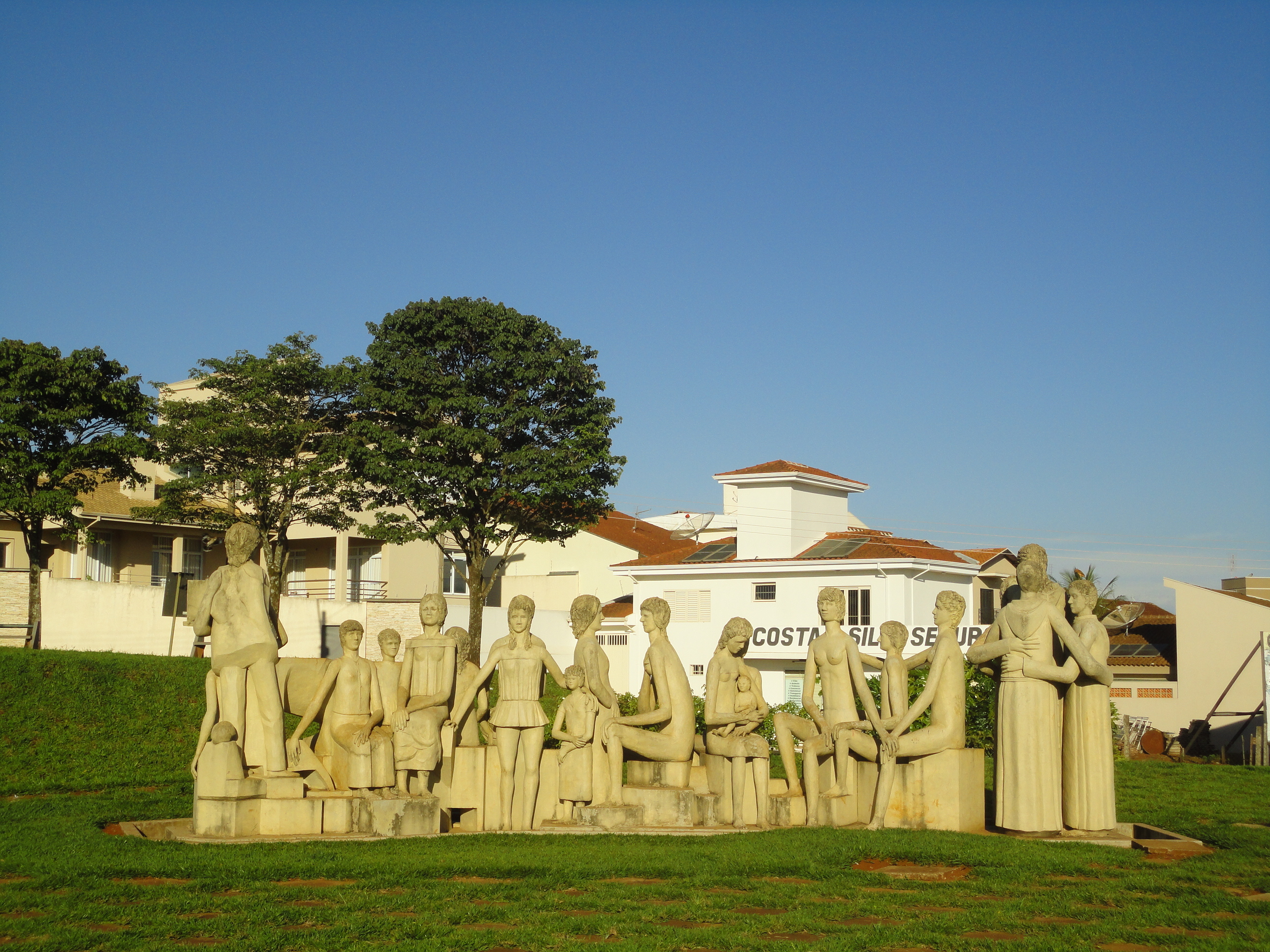 Obra de Bassano Vaccarini em Altinópolis - SP